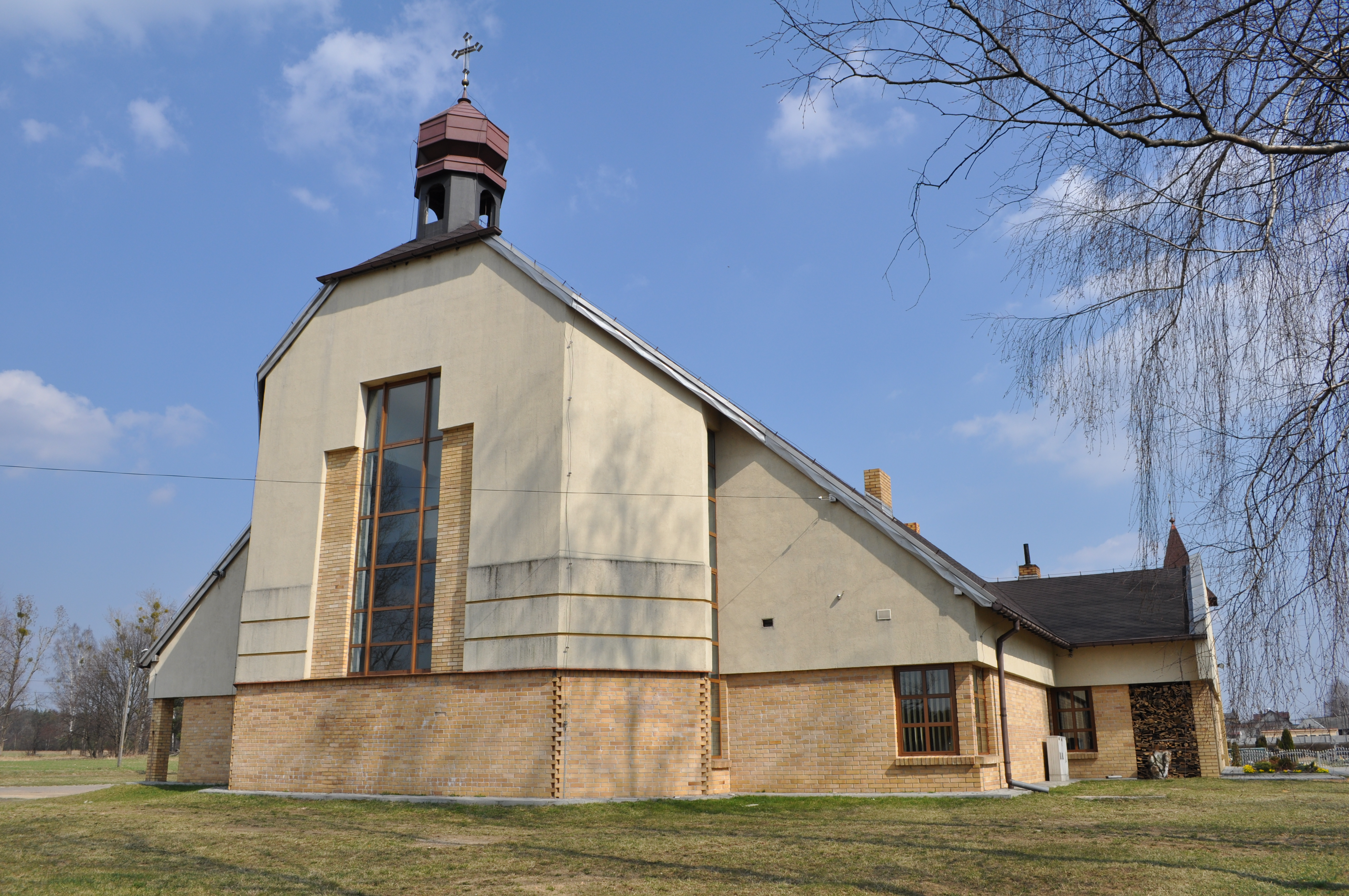 Kościół - tył